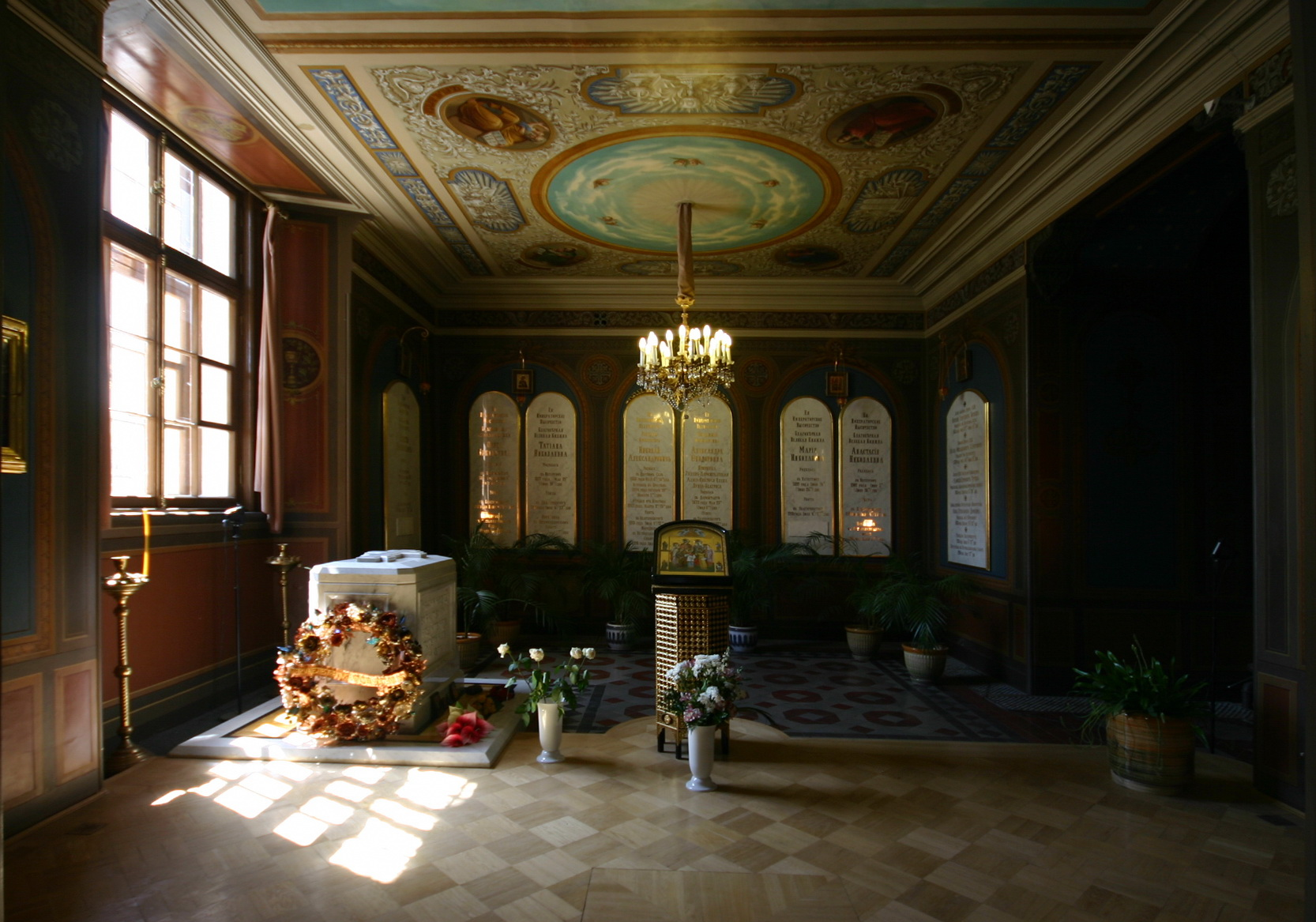 Grabraum des letzten Zaren Nikolaus II